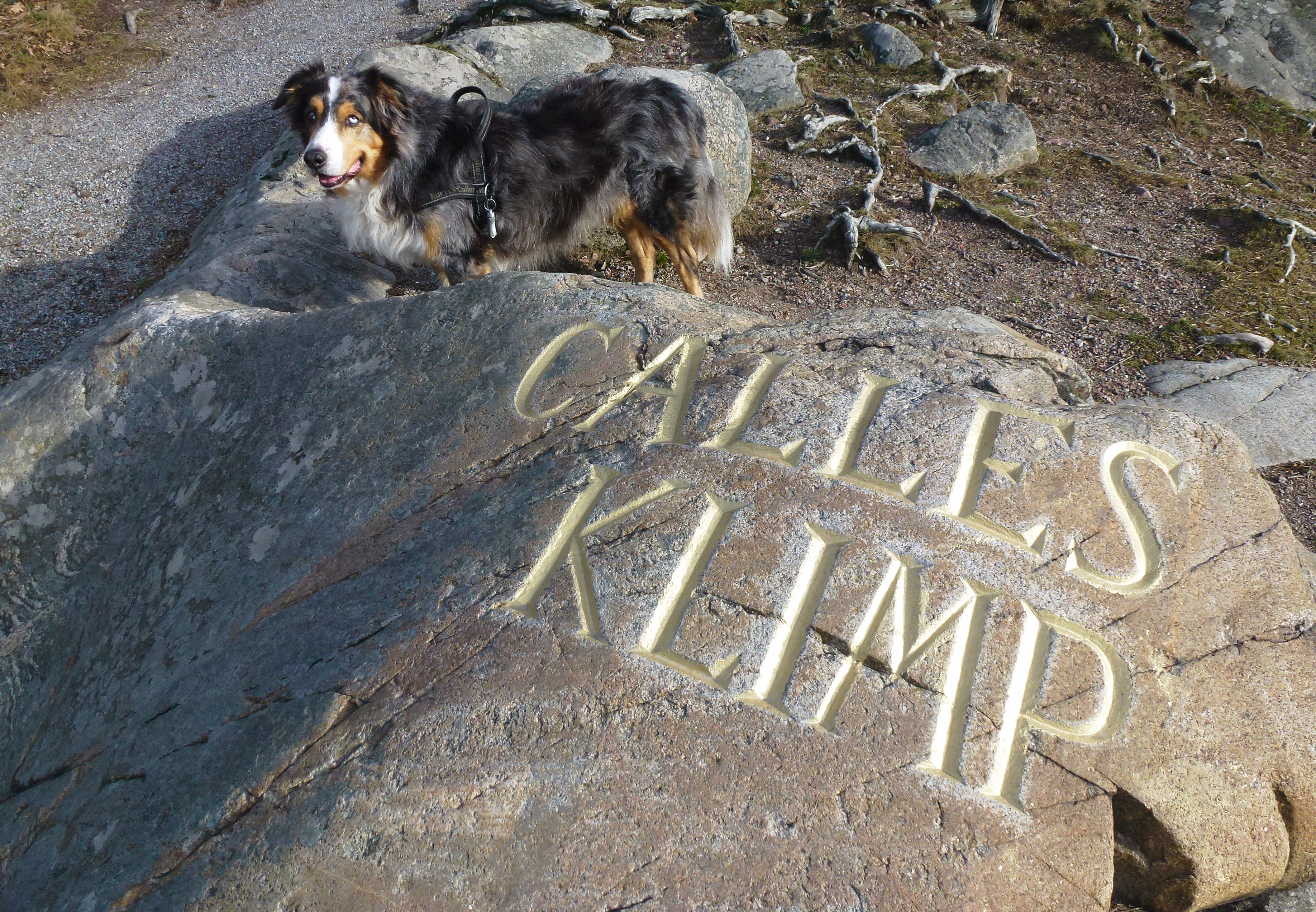 Calles klimp, Stocksundet